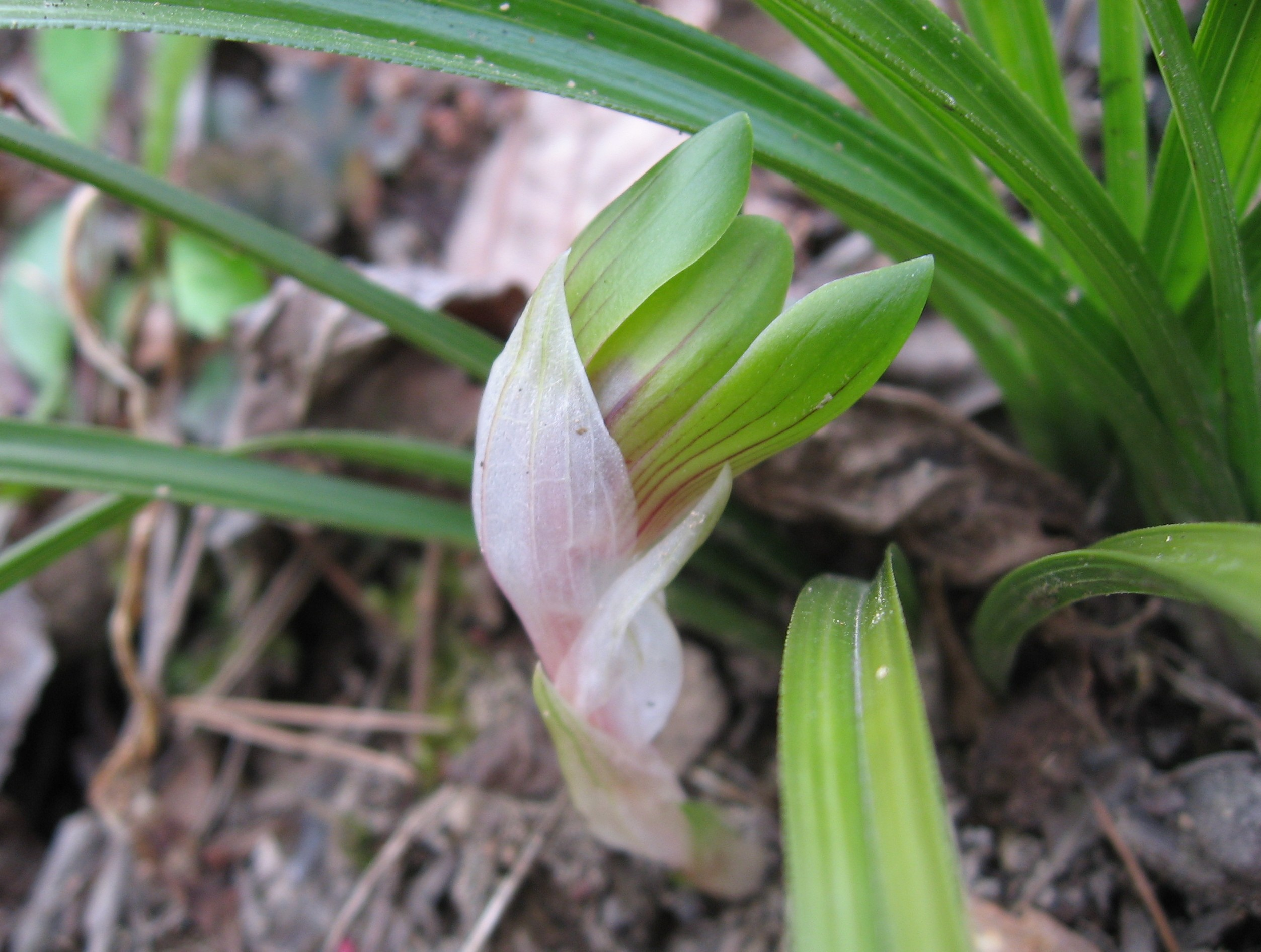 シュンラン Cymbidium goeringii